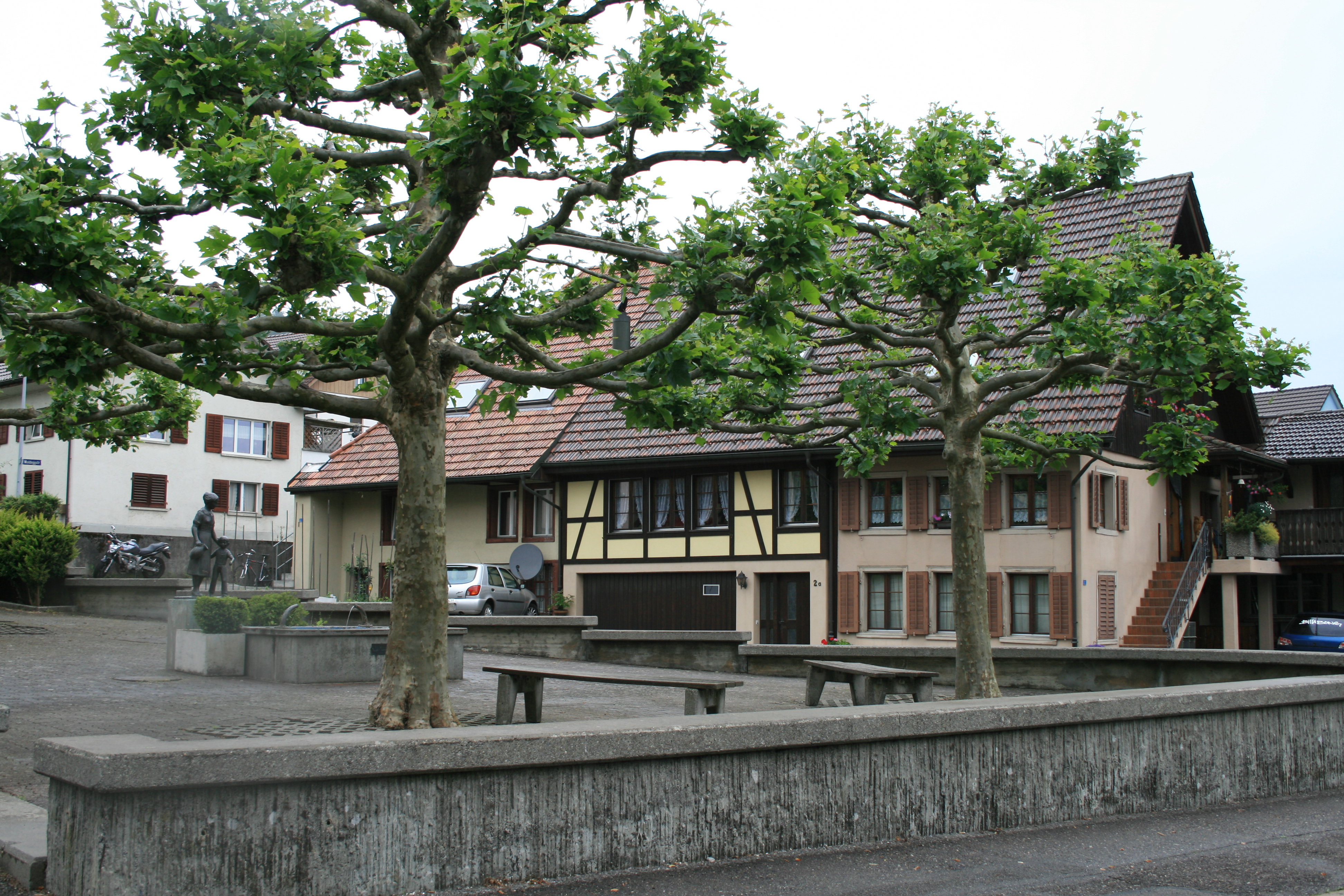 Burg AG, Schweiz